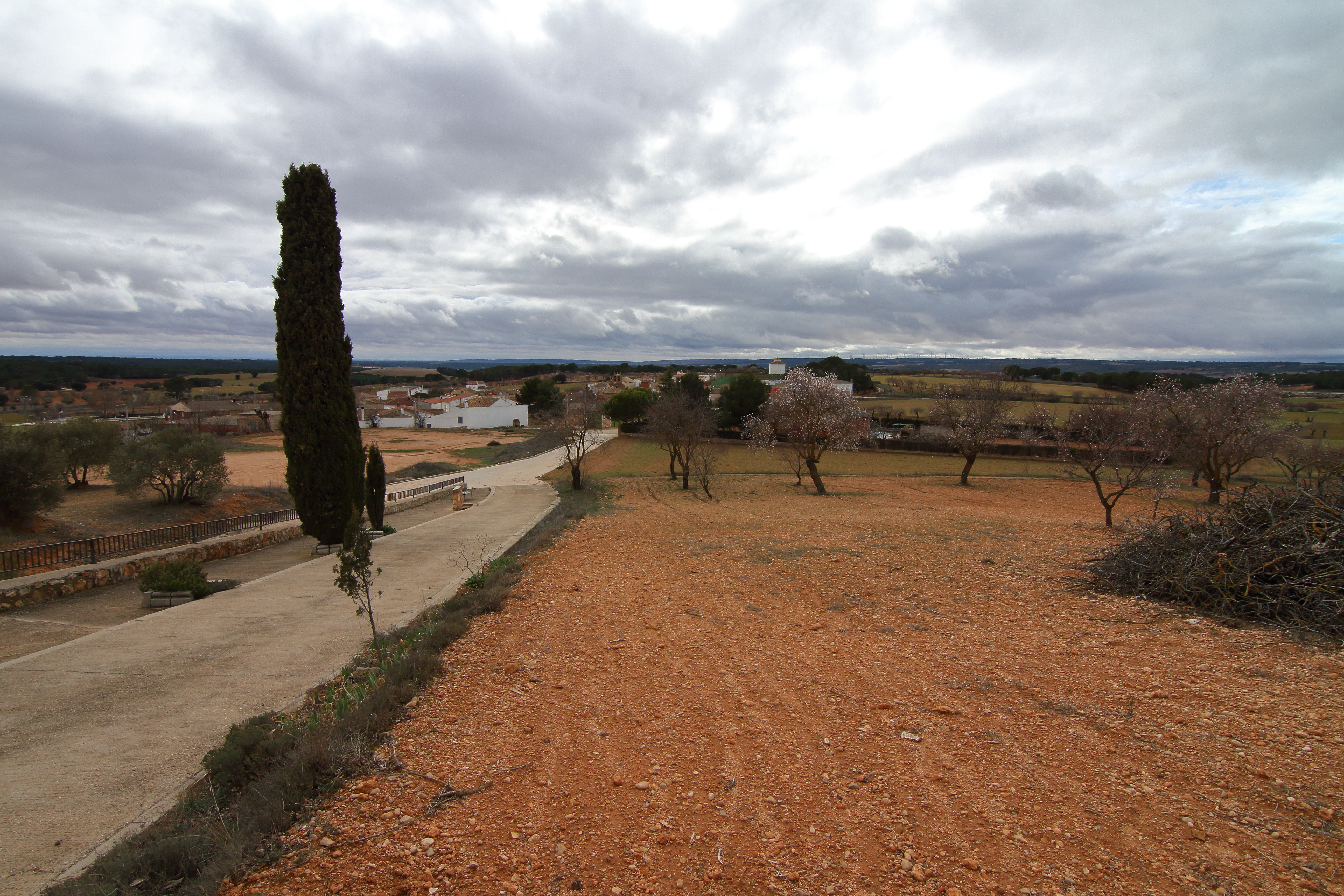 Rubielos Altos, vista de la población desde el Cementerio